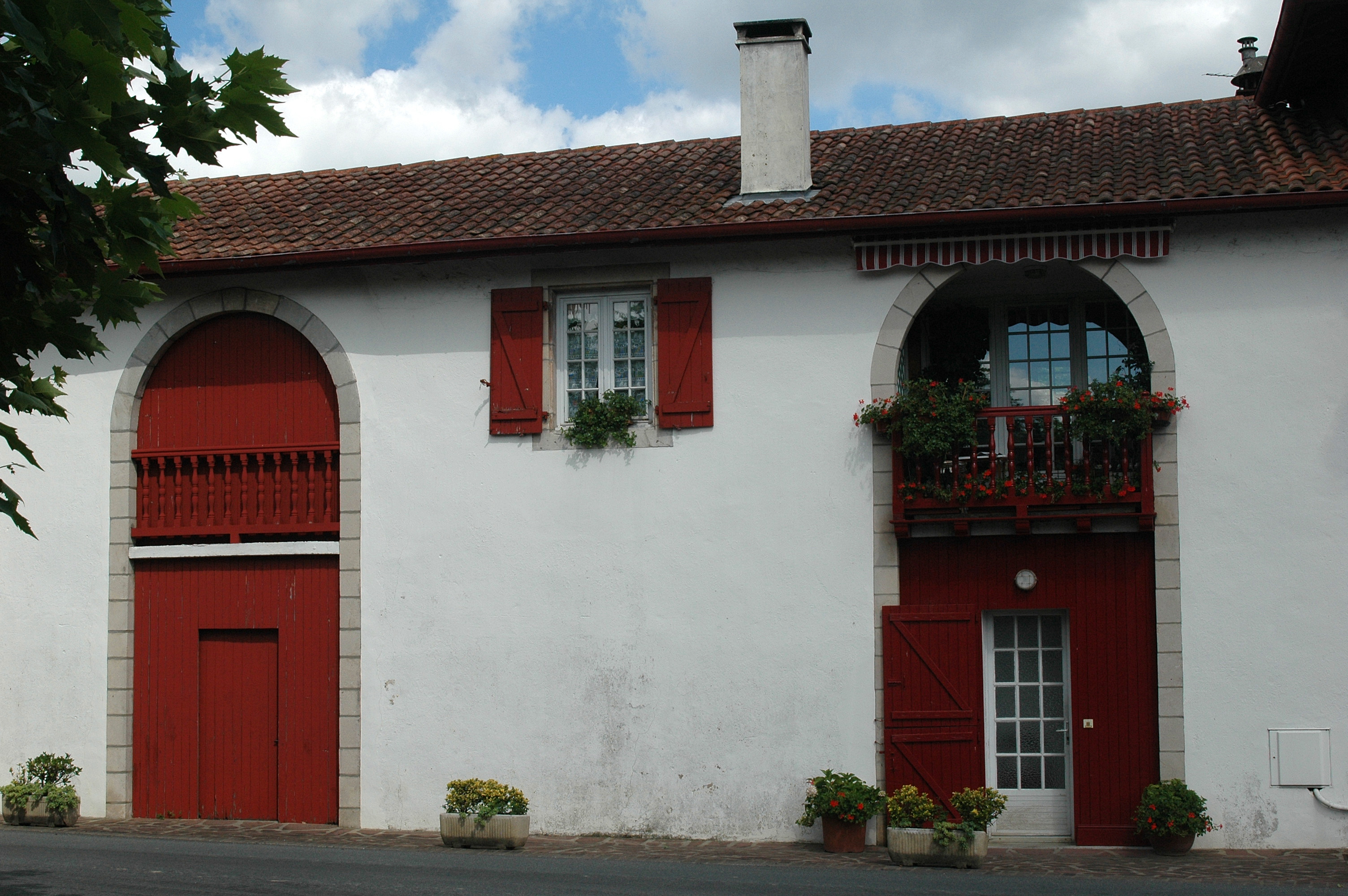 Louhossoa, ferme. Photo prise le 03/08/06 par Harrieta171